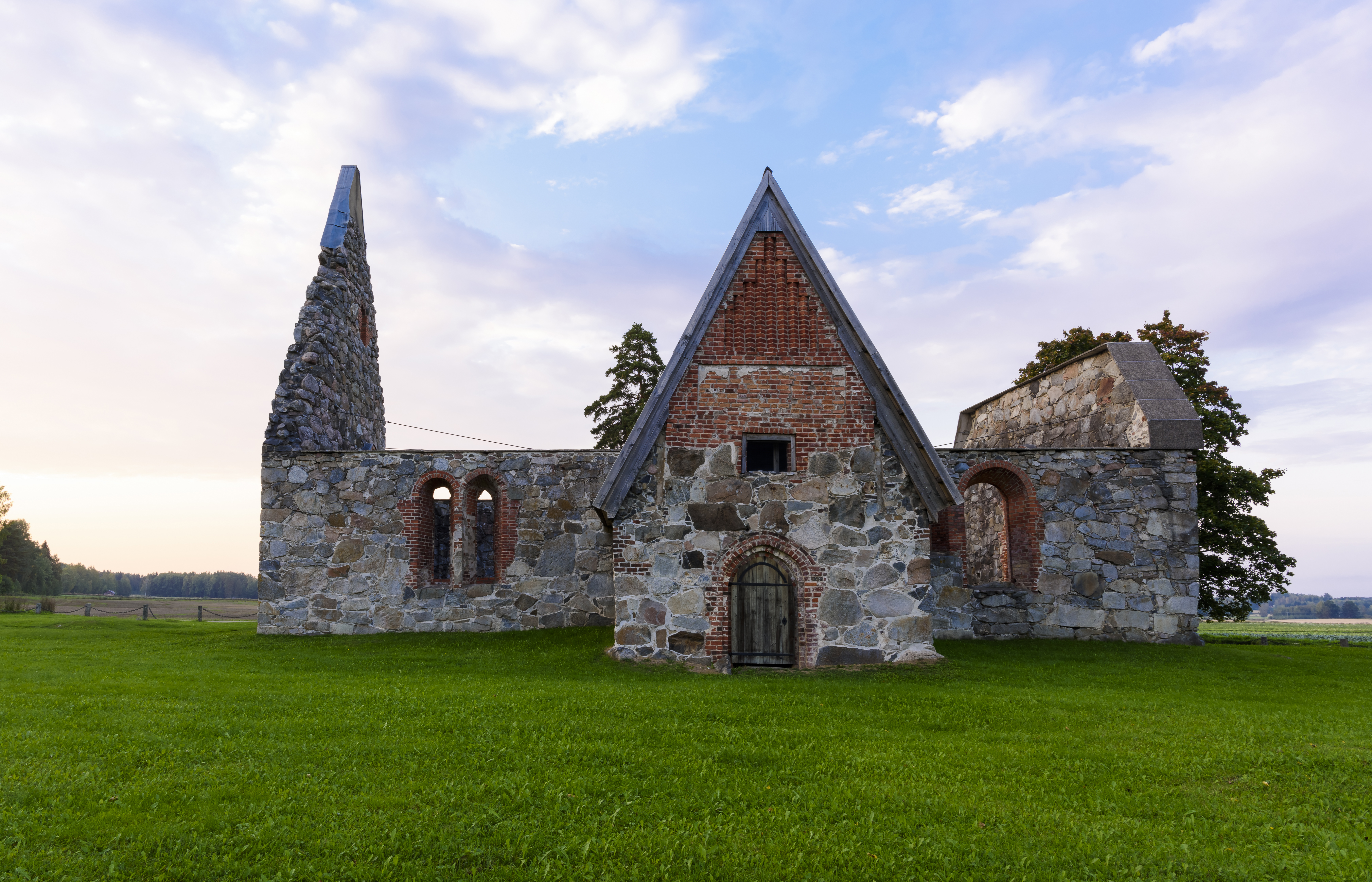 Pälkäneen rauniokirkko